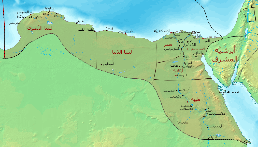 خارطة أبرشيَّة مصر (Dioecesis Aegypti) حوالي سنة 400 للميلاد، تظهرُ فيها المُحافظات التابعة لها وأهم المُدن.